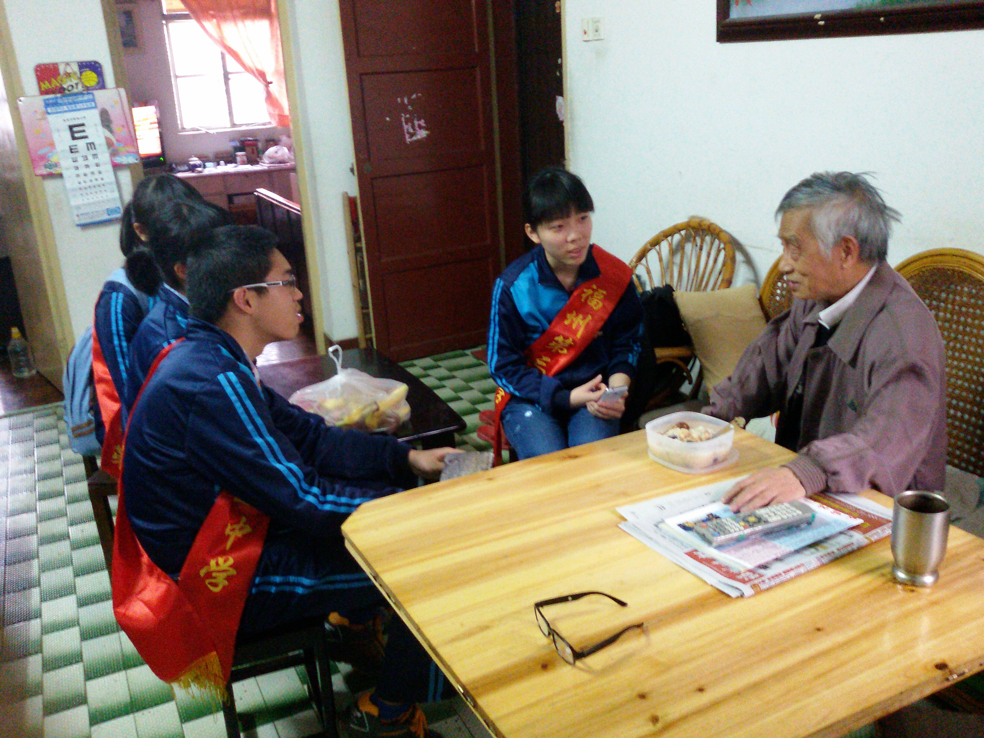 2015年拗九节（公历3月19日）福州三中青年志愿者敬老活动